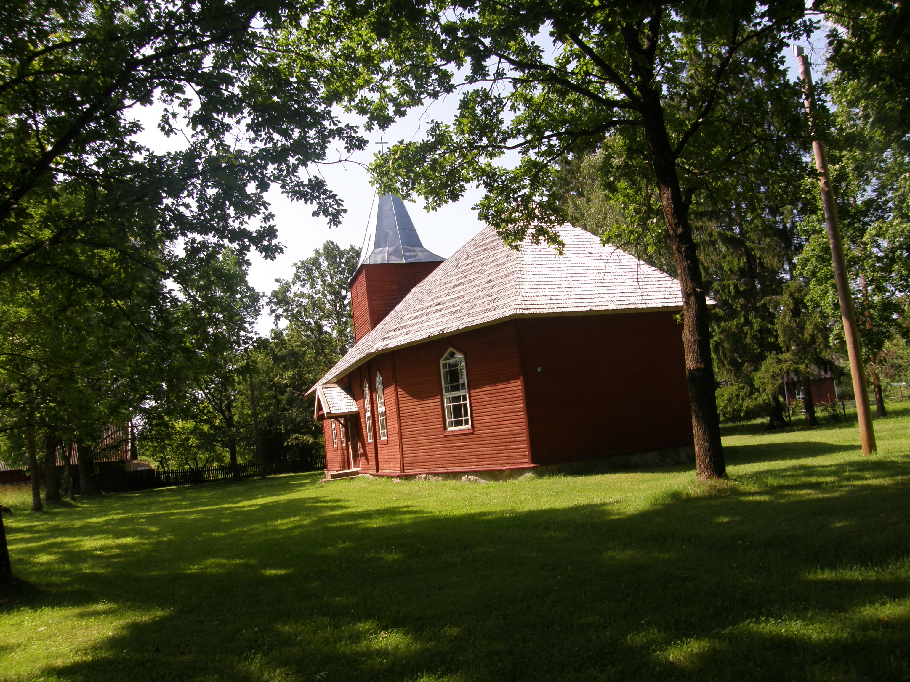 Tudu kirik.